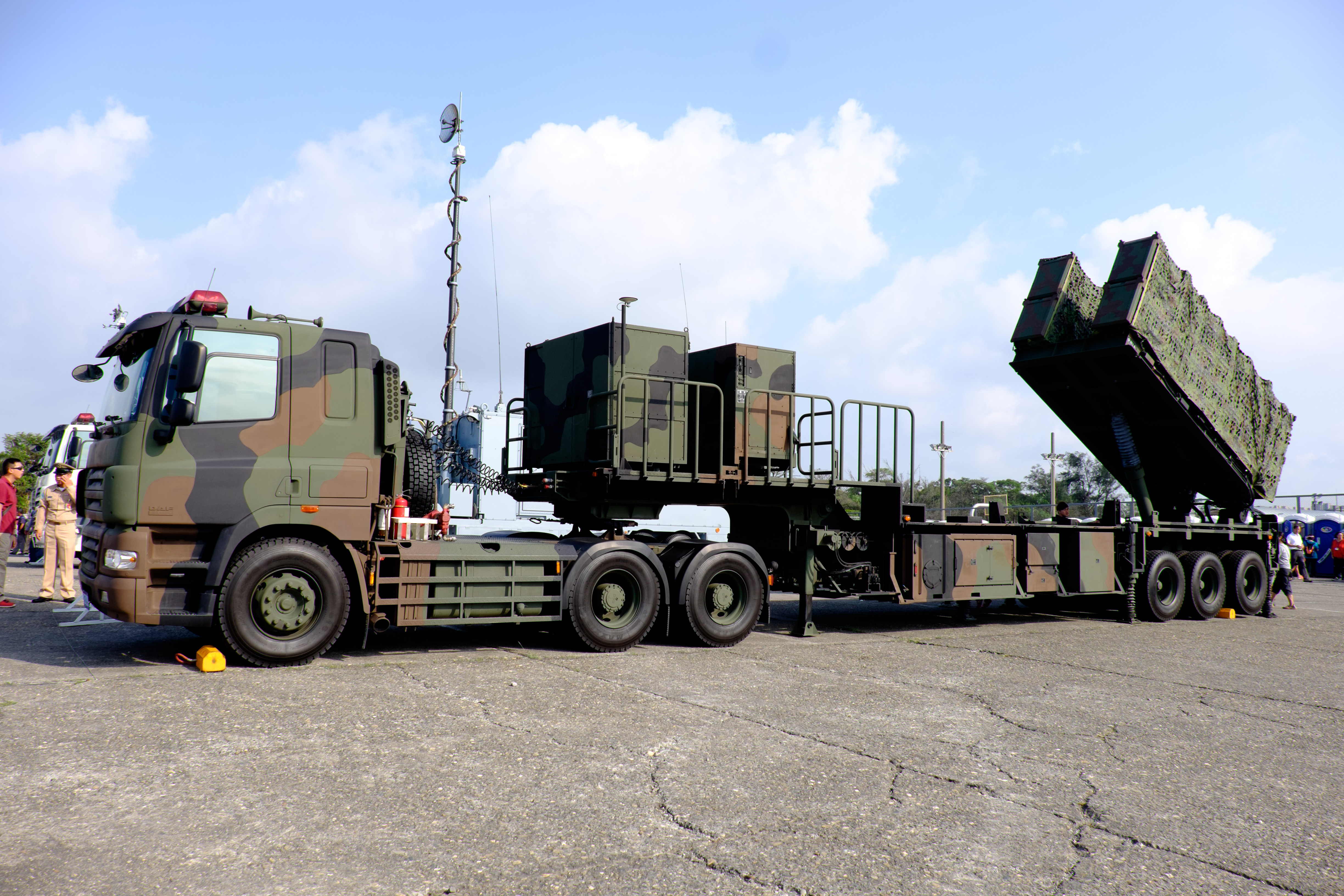 2015年左營軍港營區開放活動，艦隊指揮部操場展示機動雄風二型與三型反艦飛彈發射車。